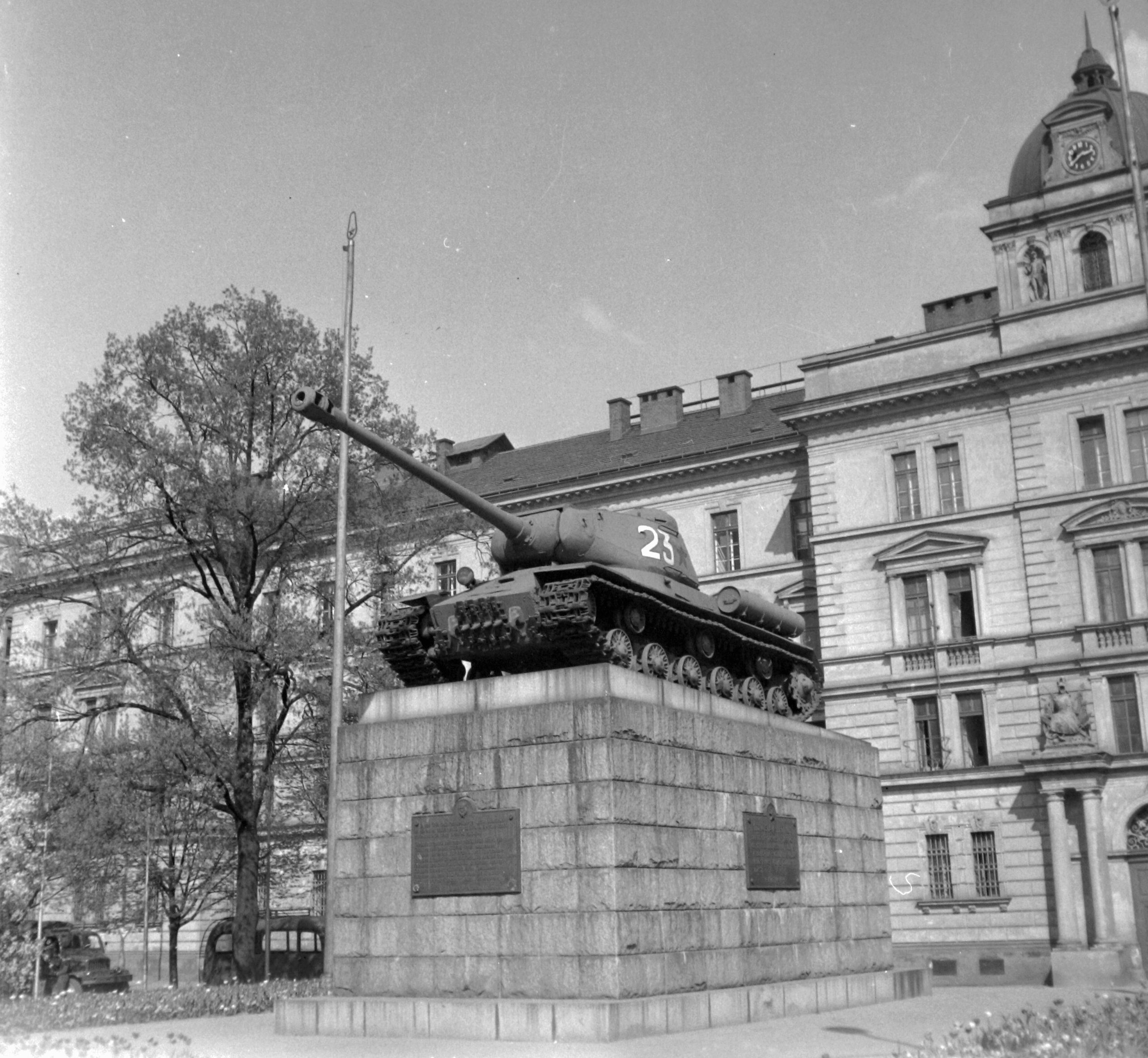 Kinských tér, szovjet harckocsizó emlékmű. Háttérben az Igazságügyi palota. Location: Czech Republik, Prague Tags: Czechoslovakia, Soviet brand, tank, memorial plaque, flag pole Title: Kinských tér, szovjet harckocsizó emlékmű. Háttérben az Igazságügyi palota.